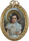 Retrat Nena amb barret (1911)